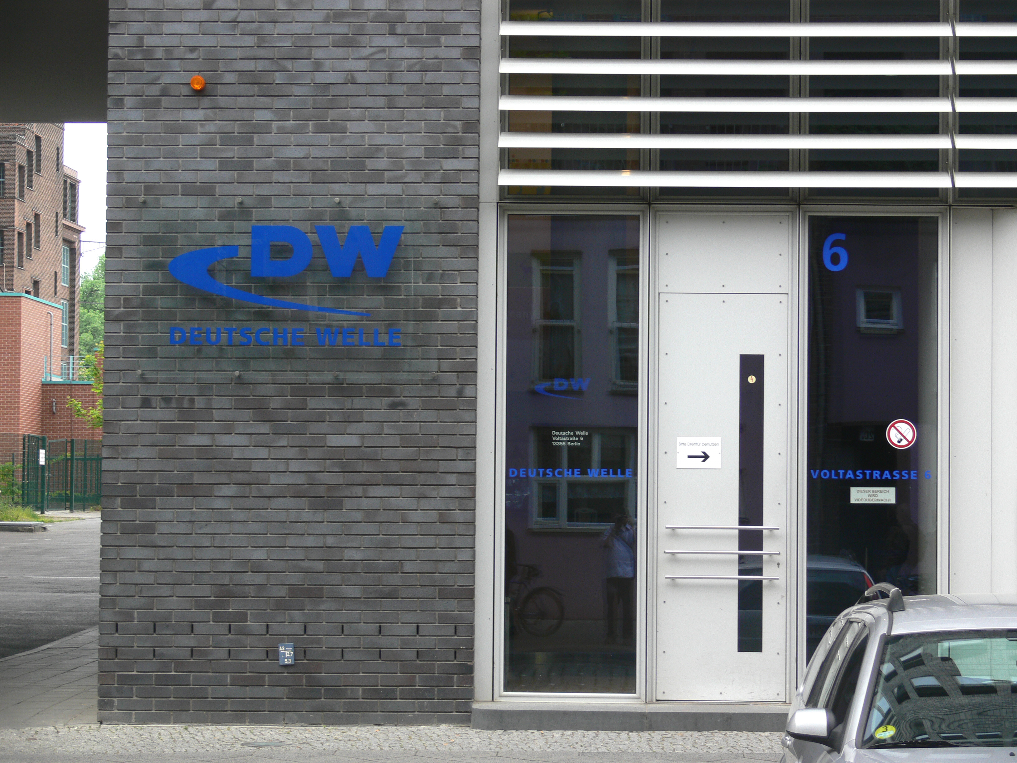 Berlin-Gesundbrunnen, ehemaliges AEG-Fabrikgelände am Humboldthain, Voltastraße 6, Deutsche Welle